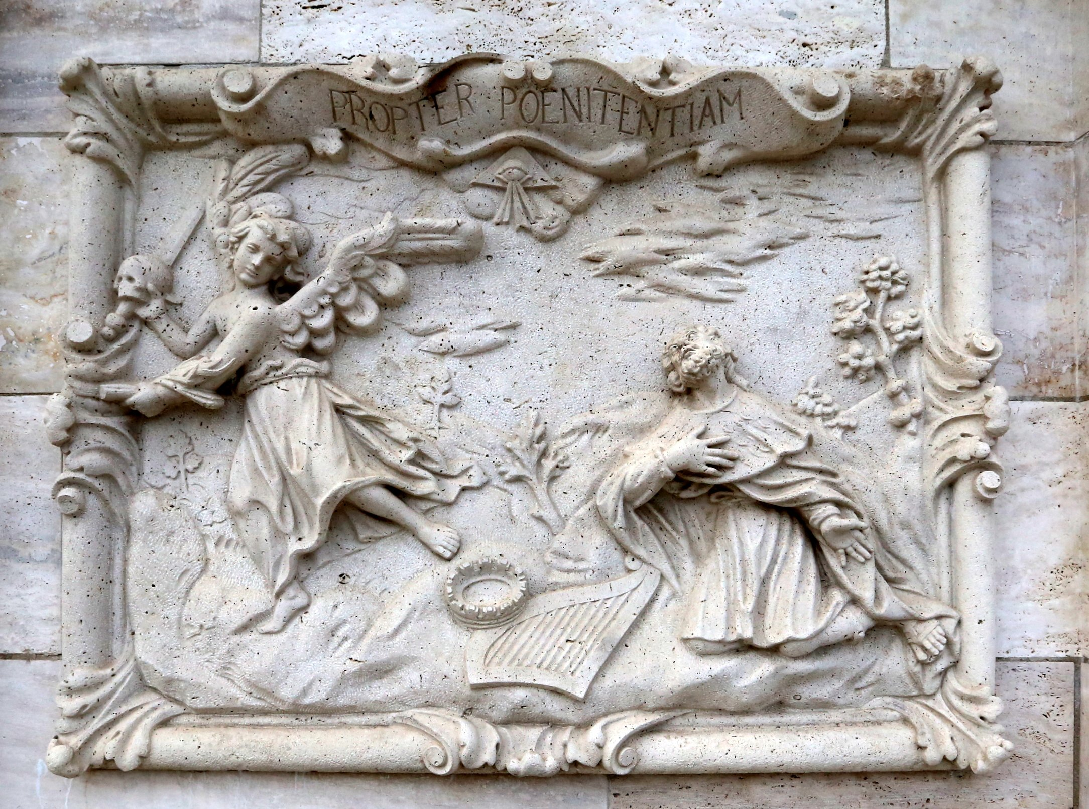 Dávid könyörgése (ld. 1Krón 21, felirata: Propter poenitentiam - a bűnbánat miatt)